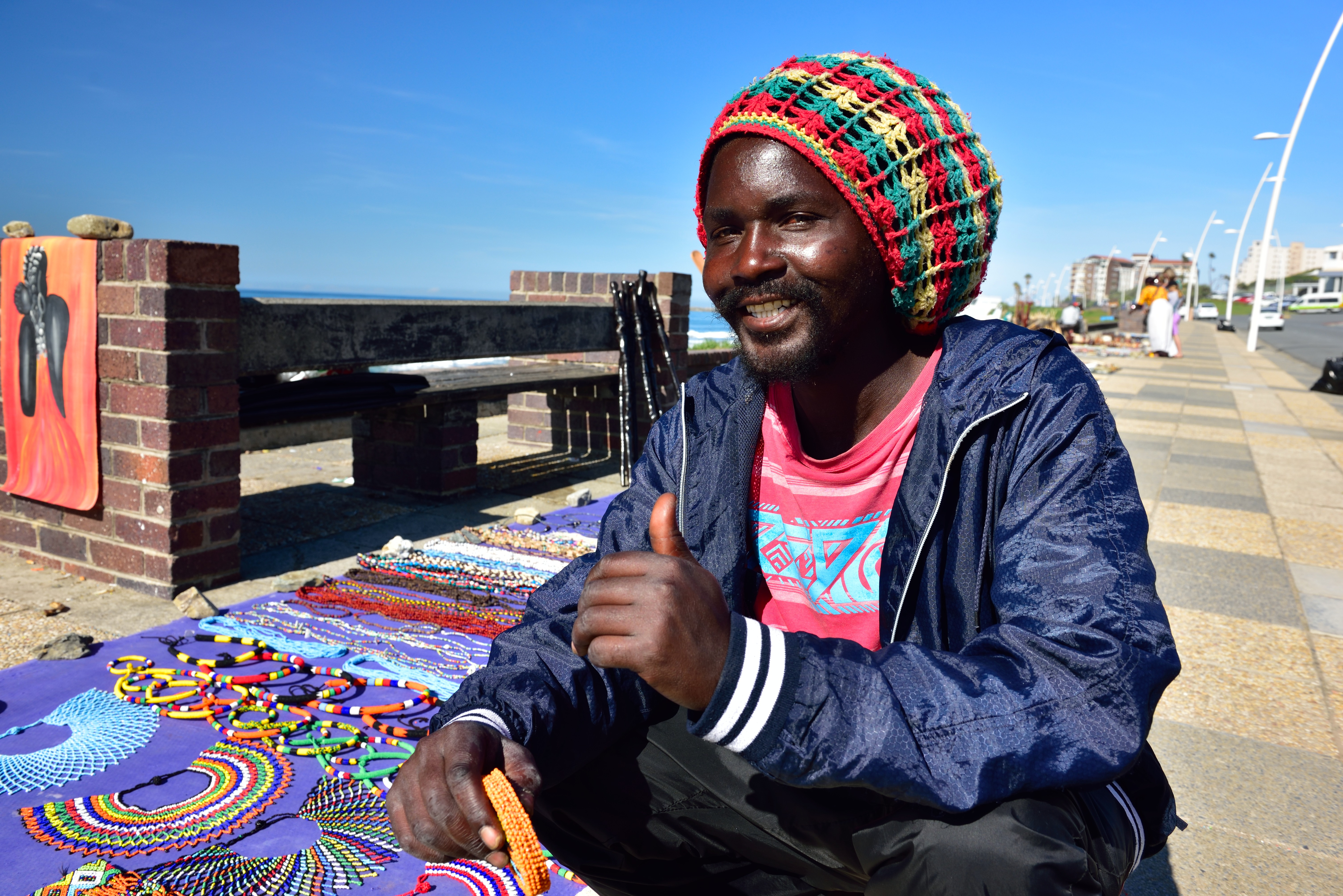 Vue de l'Eastern Cape en Afrique du Sud.